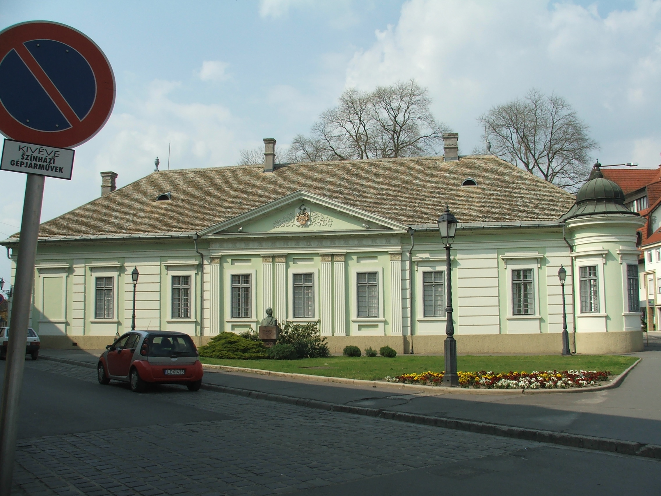 Vojnich-kúria This is a photo of a monument in Hungary. Identifier: 2097